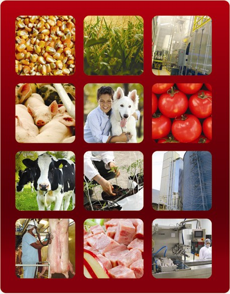 Nuestros procesos y productos